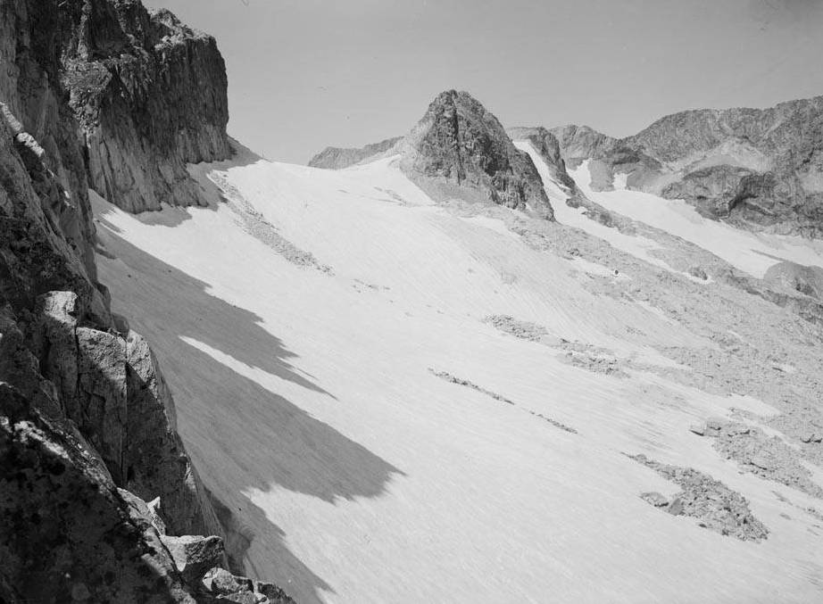 Imatge